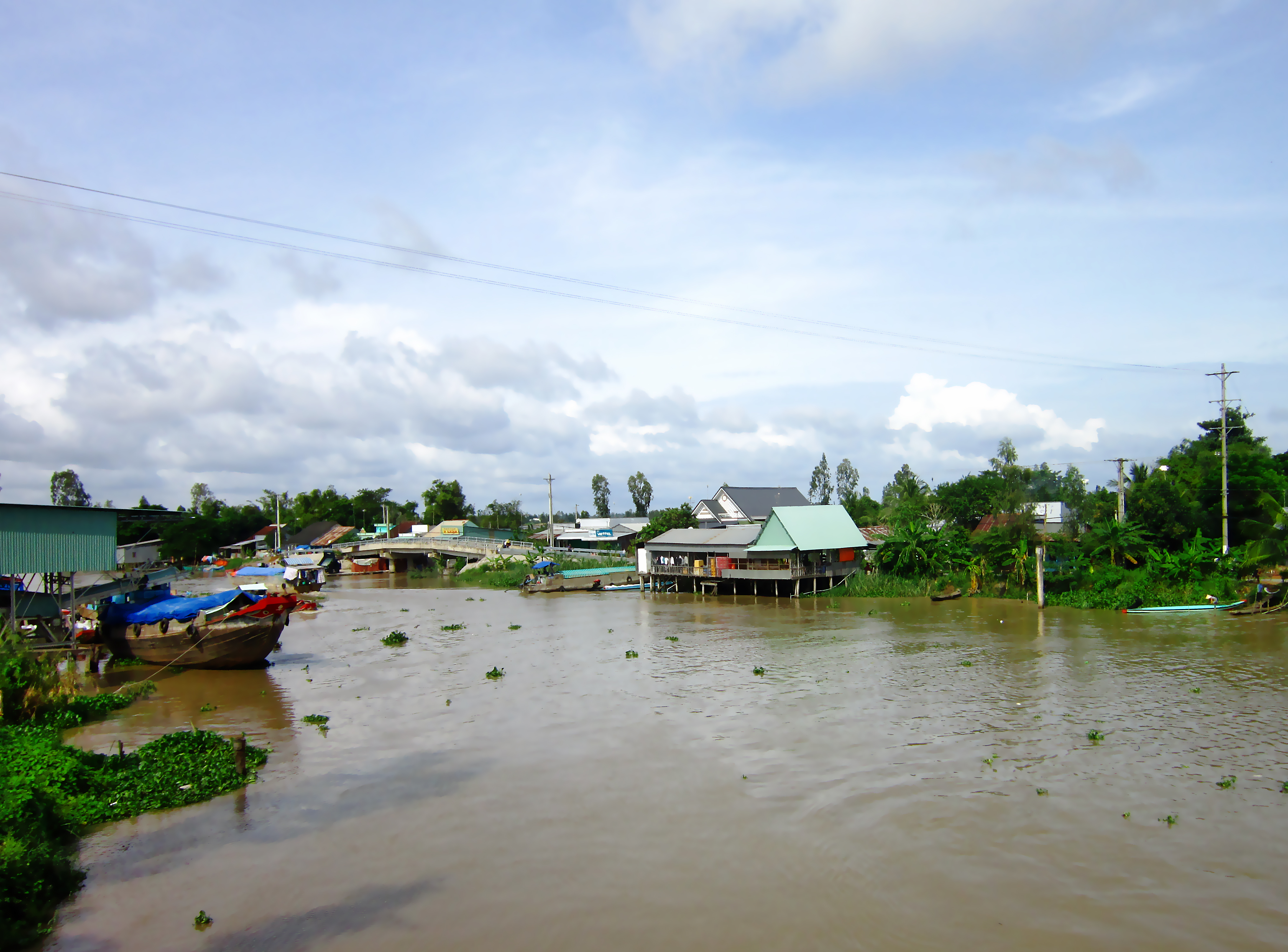 Kênh Thoại Hà, đoạn chảy qua xã Tân Thành thuộc huyện Tân Hiệp, tỉnh Kiên Giang, Việt Nam.